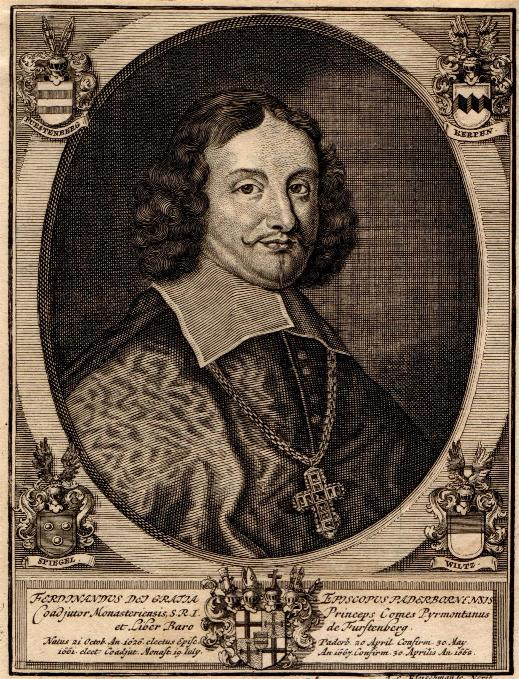 Ferdinand v. Fürstenberg, Fürstbischof von Paderborn (1626-1683)